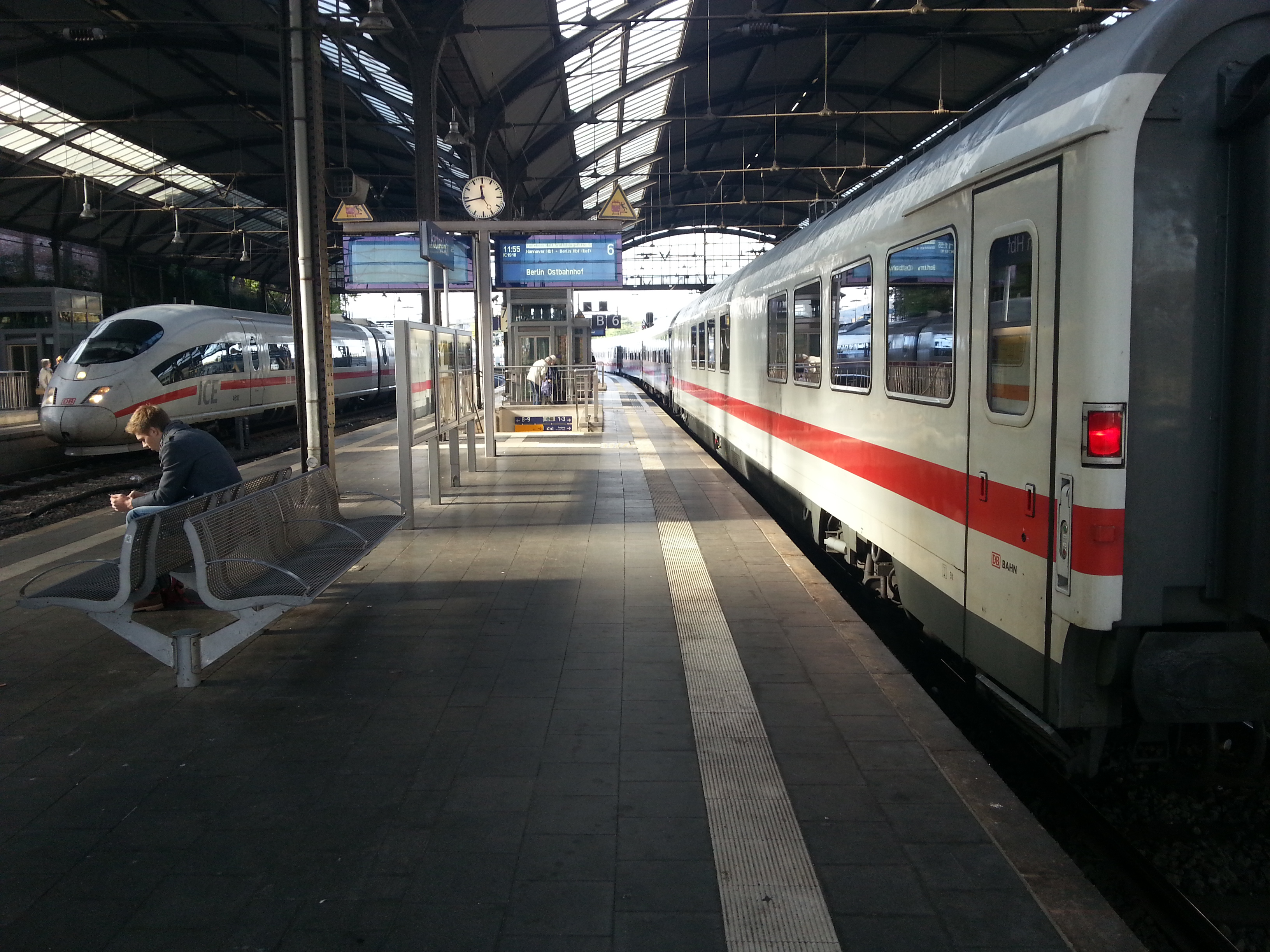 Fernverkehr im Aachener Hauptbahnhof. Rechts der ICE 79 von Brüssel-Süd nach Frankfurt am Main. Links der IC 1918 von Aachen nach Berlin Ostbahnhof.